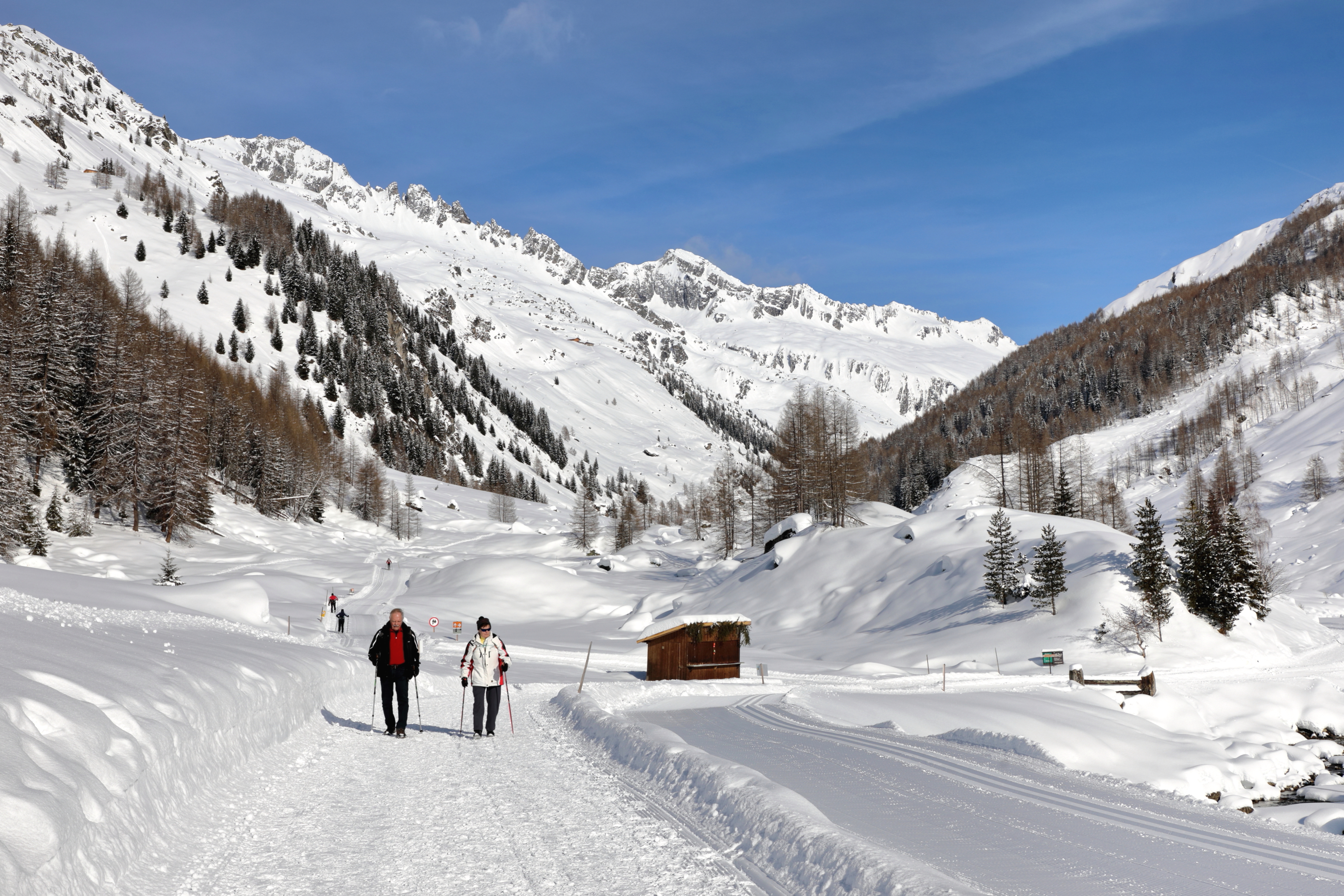 Blick ins hintere Ahrntal mit Blickrichtung auf die 2871 m hohe Steinkarspitze, auch als Steinkarkopf bezeichnet, von der Sonnenloipe in Kasern, nördlichstes Dorf Italiens und zur Südtiroler Gemeinde Prettau gehörend.